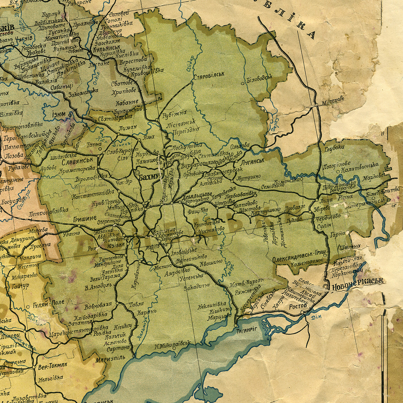 Донецька губернія, фрагмент мапи Української соц. рад. республіки, 1922